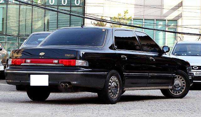 현대 다이너스티 리무진